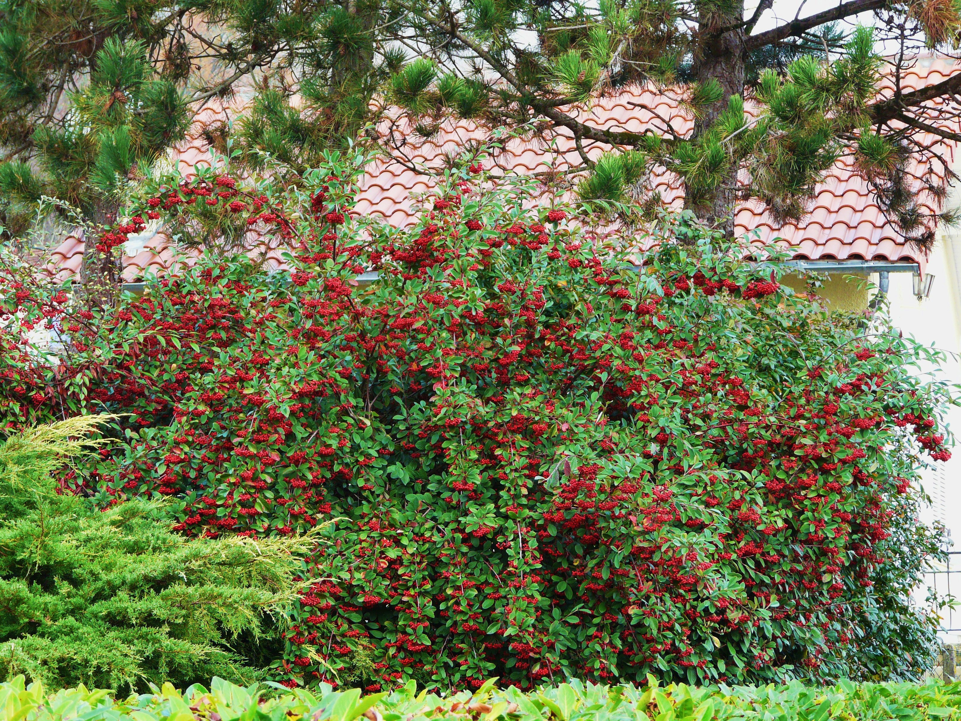 Buisson de Cotonéaster laiteux (Cotoneaster lacteus) à l'automne